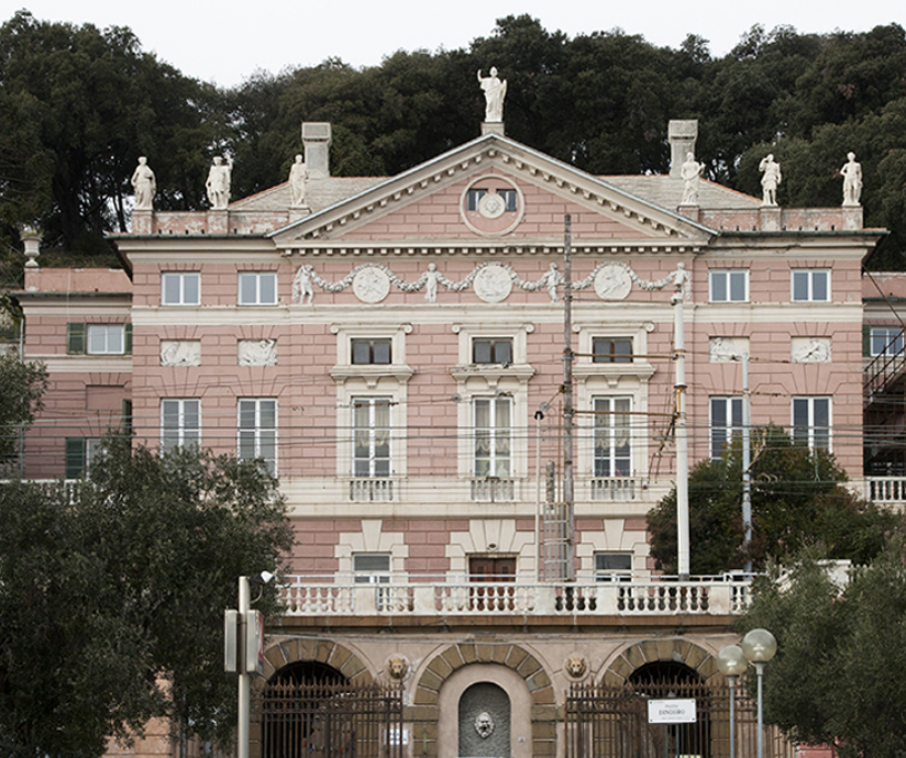 Villa Di Negro Rosazza Genova